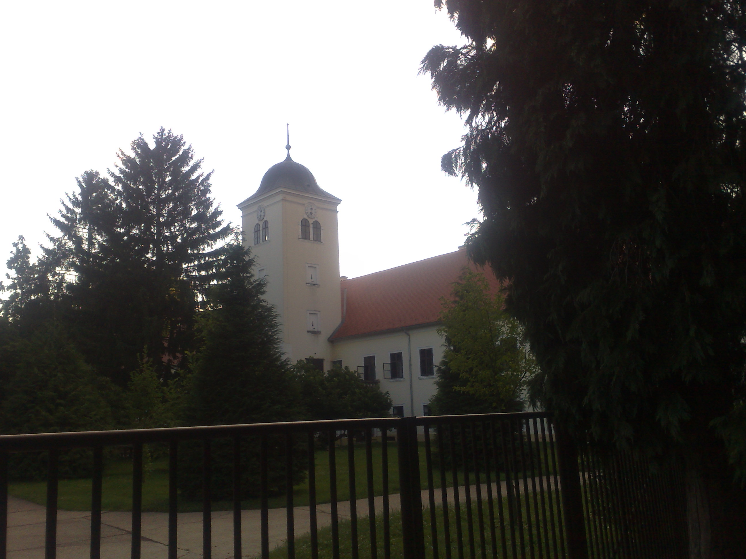 Csákánydoroszló - Batthyány-kastély